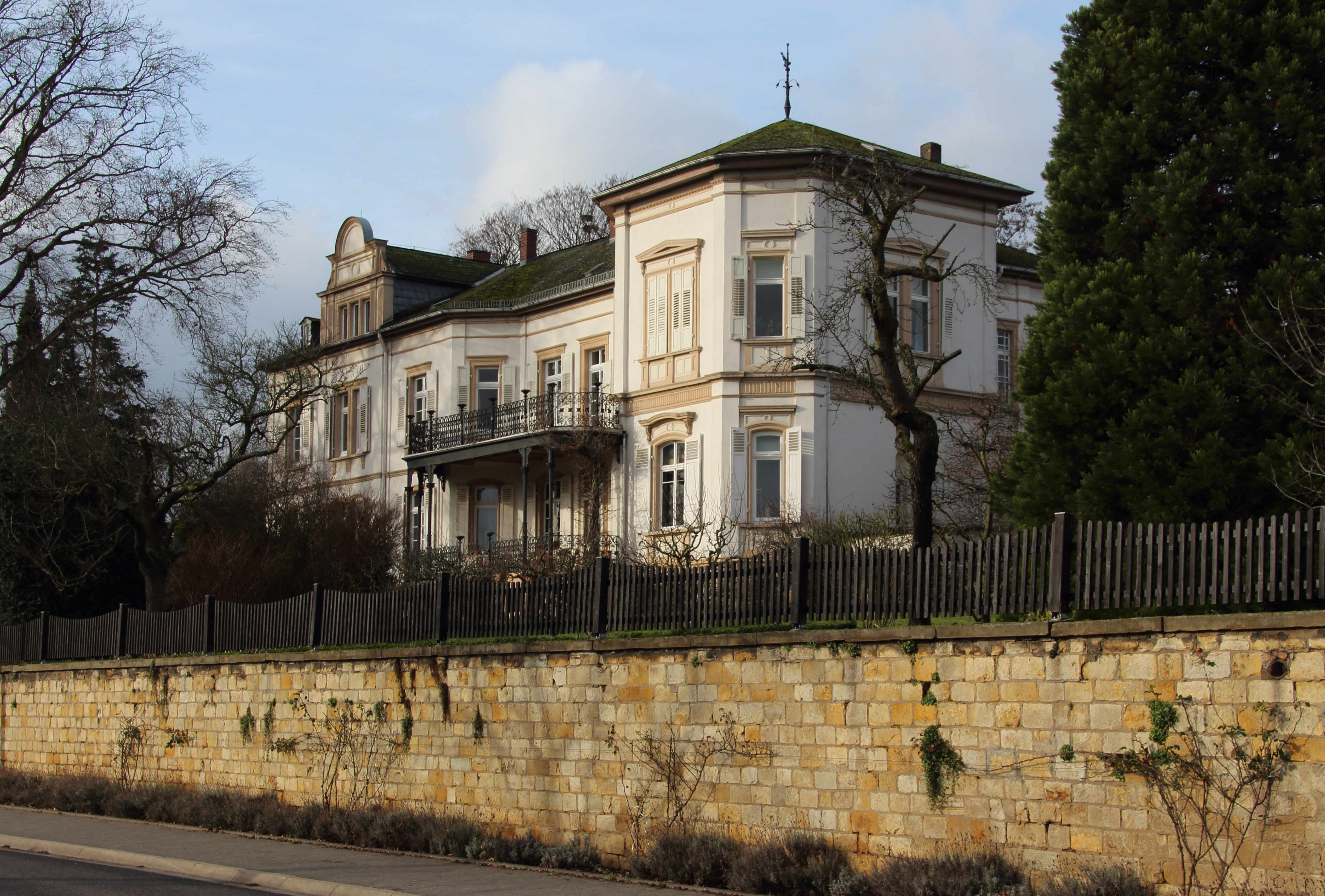 Villa Stosch, um 1860 für Dr. Carl Bertrand erbaut. Um 1871 erworben von Alfred von Stosch (1818-1896). Gartengestaltung ab 1875 durch Heinrich Siesmayer. Um 1880 erweitert nach Plänen des Architekten Heinrich Velde. Grenzstr. 1, Mittelheim im Rheingau.